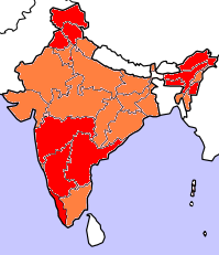 Kartorna bygger på resultat i senaste delstatsval (Juni 2004). Rött betyder att partiet deltar i delstatsregeringen, orange att partiet vann mandat i senaste delstatsvalet och gult att partiet hade lanserat kandidater men utan att vinna mandat. Kartorna tar inte hänsyn till avhopp, partifusioner och fyllnadsval under den ordinarie mandatperiodens gång.